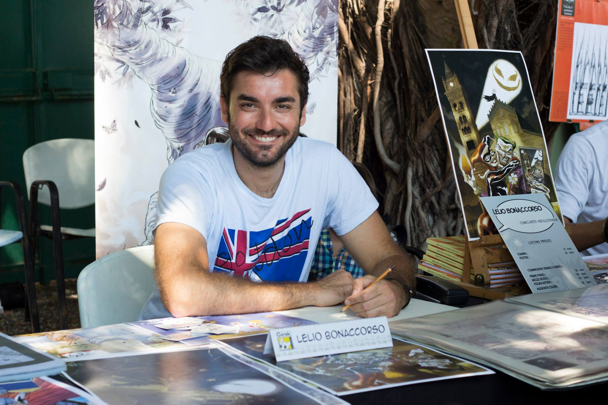 Lelio bonaccorso geek2015